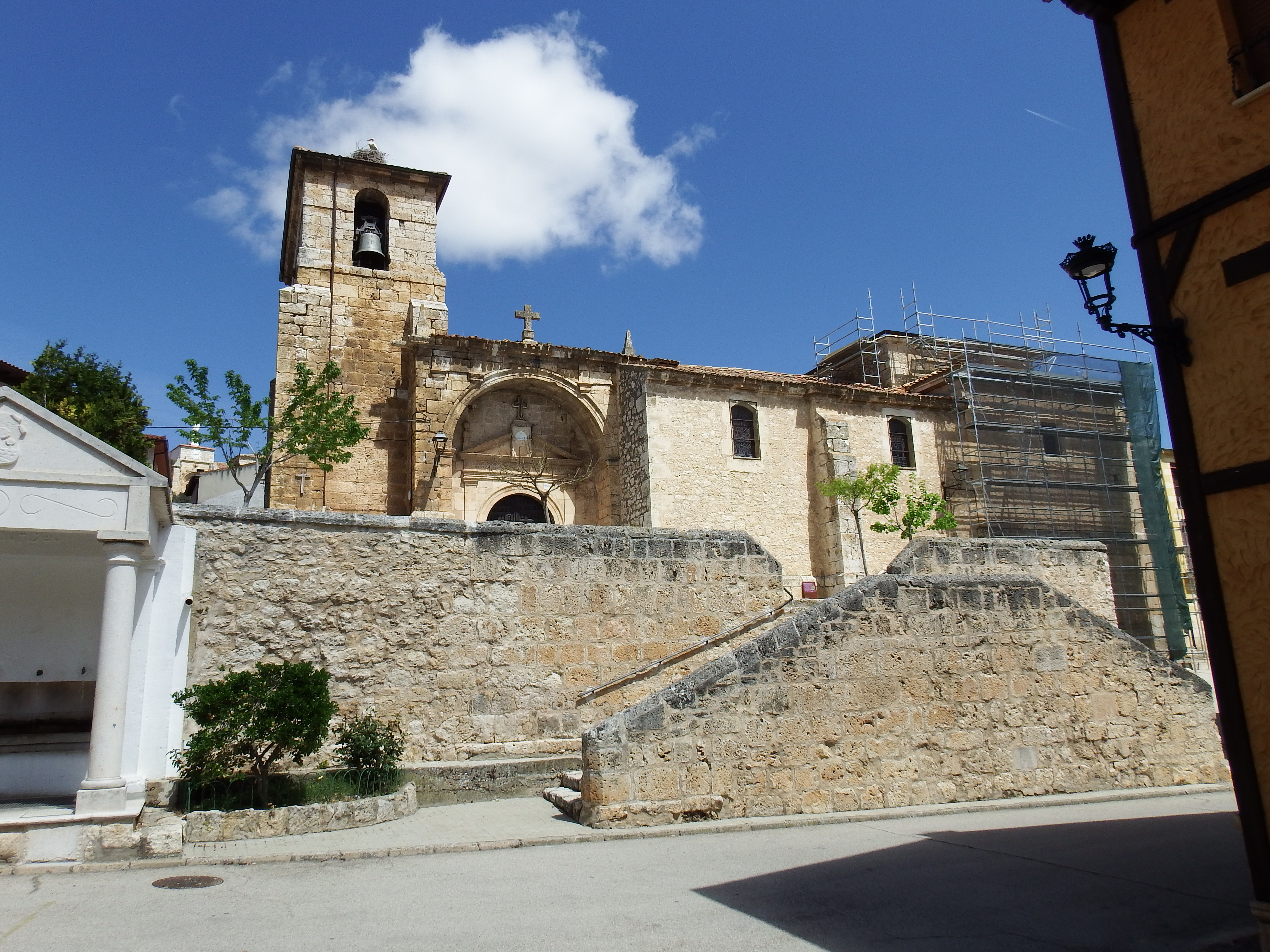 Iglesia de la Asunción. Baños de Valdearados.